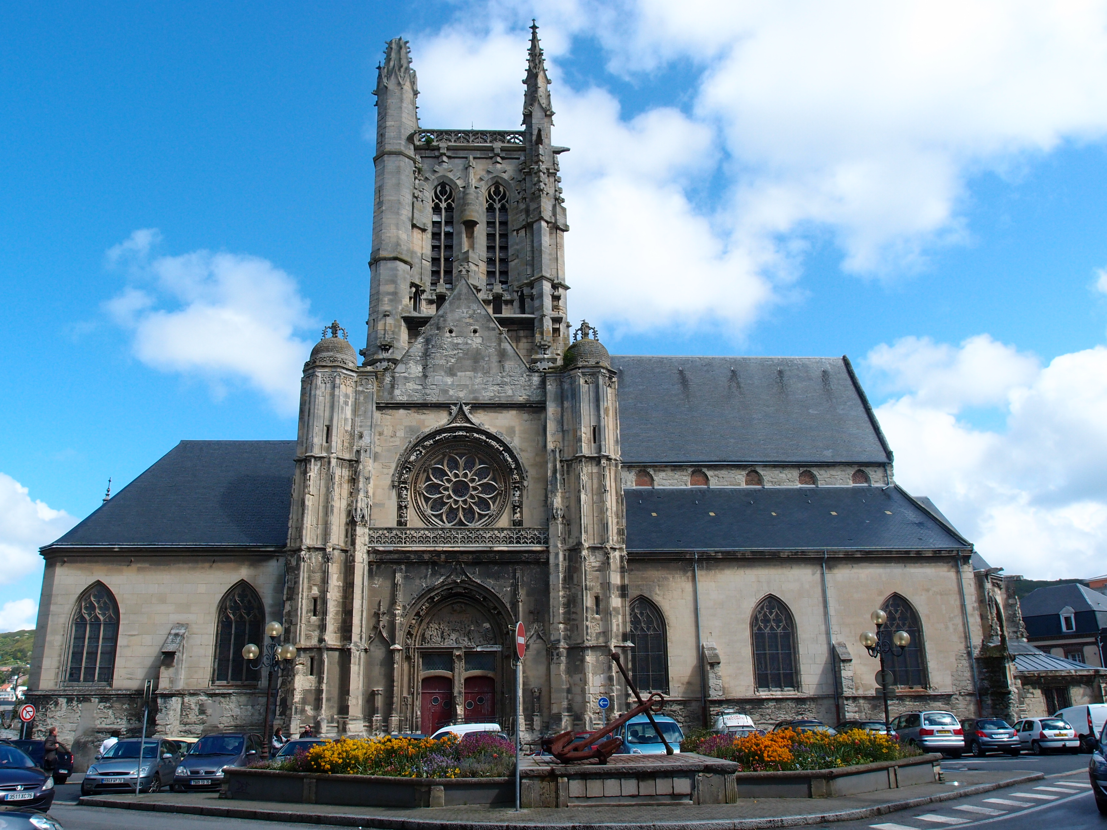 Fécamp: Kirche Saint-Etienne (franz.: Église Saint-Étienne de Fécamp) Datum: 15.05.2012 Urheber: M. Pfeiffer alias Benutzer:Gordito1869 Quelle: privates Fotoarchiv des Urhebers